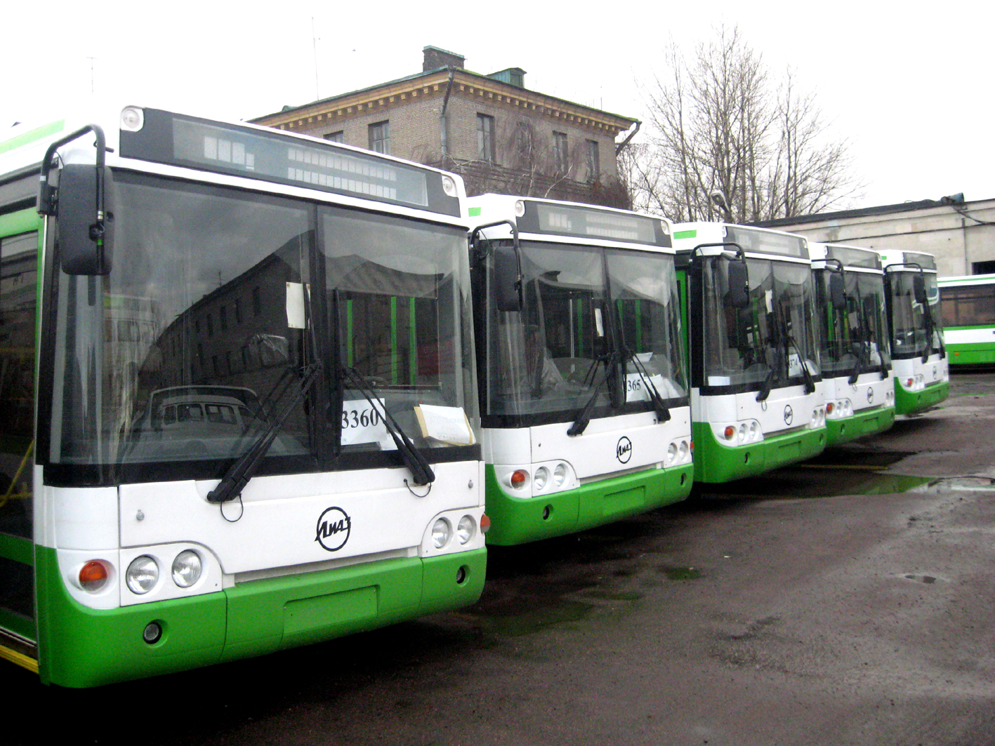 ЛиАЗ 5292.20